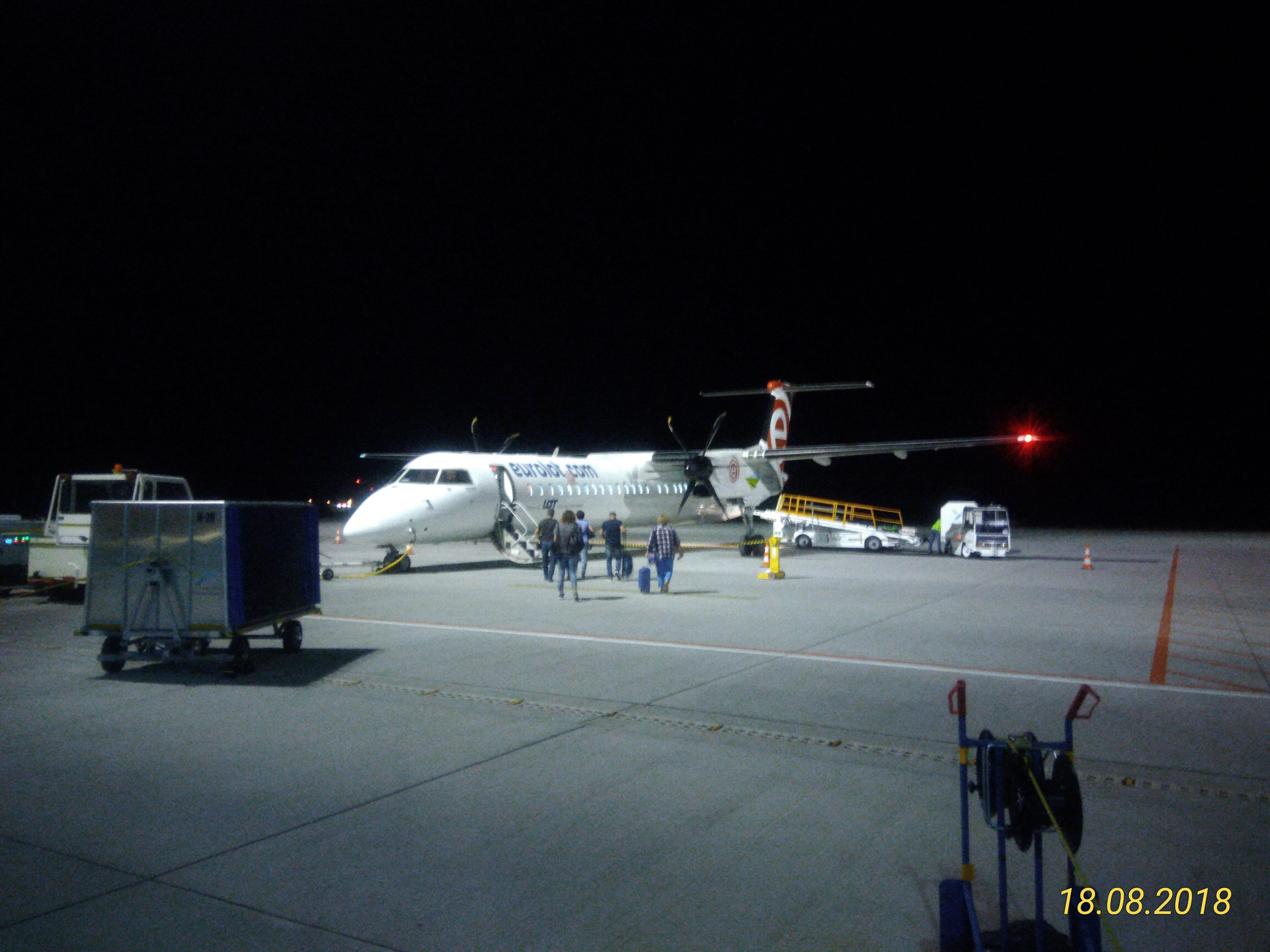 Płyta postojowa Olsztyn-Mazury z samolotem LOT odlatującym do Lwowa